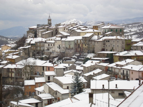 Pasquetta a Sante Marie